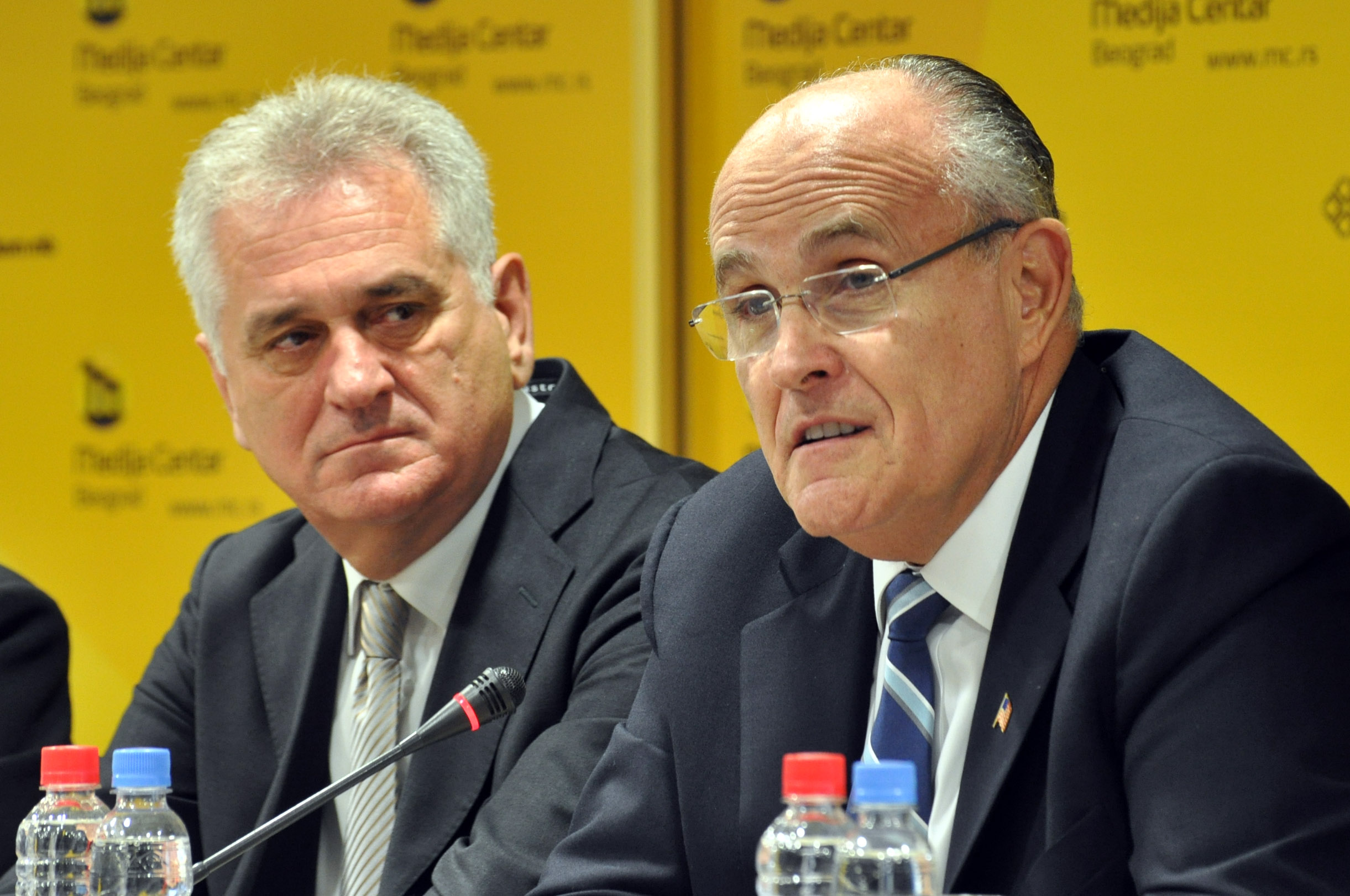 Tomislav Nikolić & Rudy Giuliani